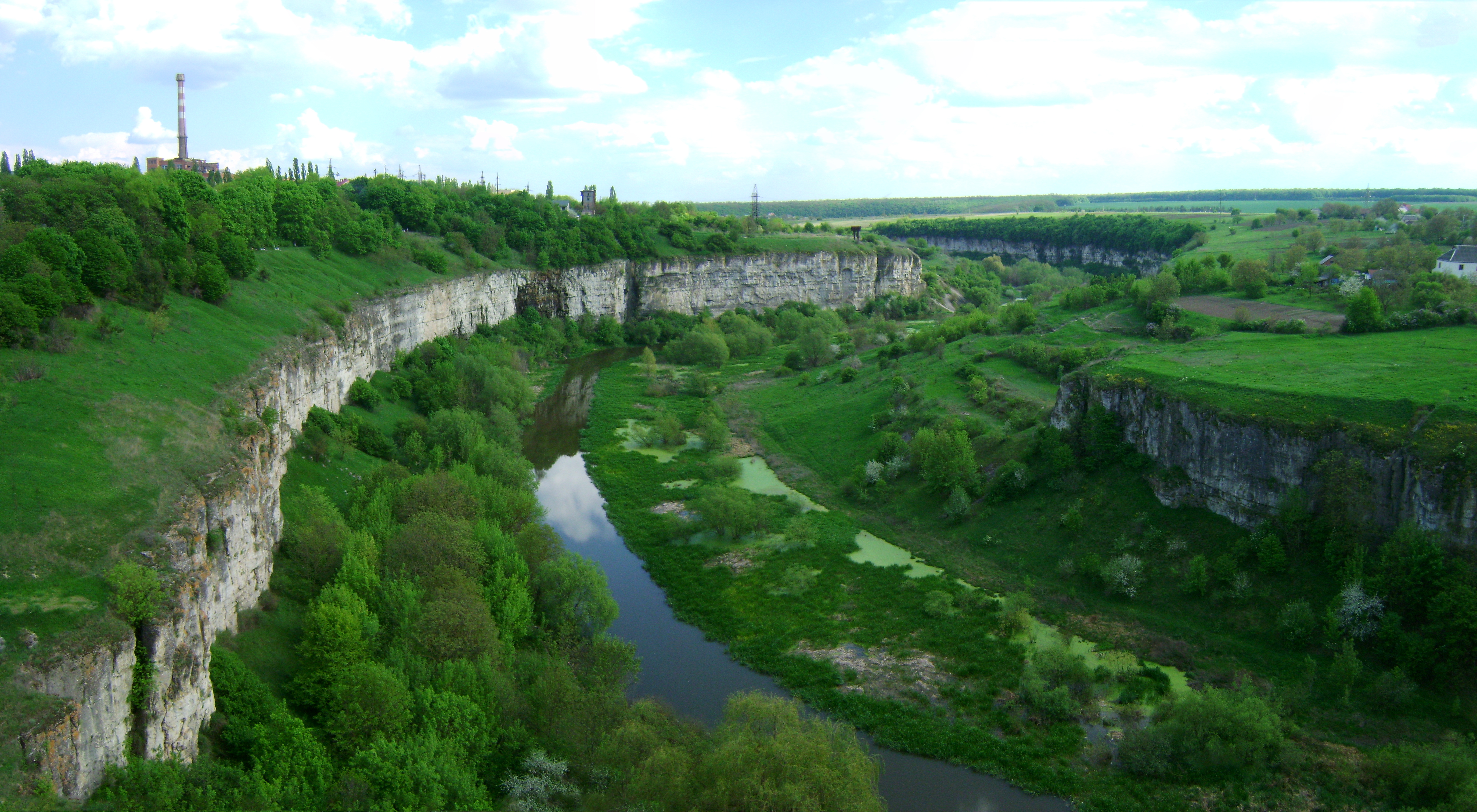 Смотрицький каньйон, Кам'янець-Подільський район, Від с. Голоскіу до с. Цибулівка